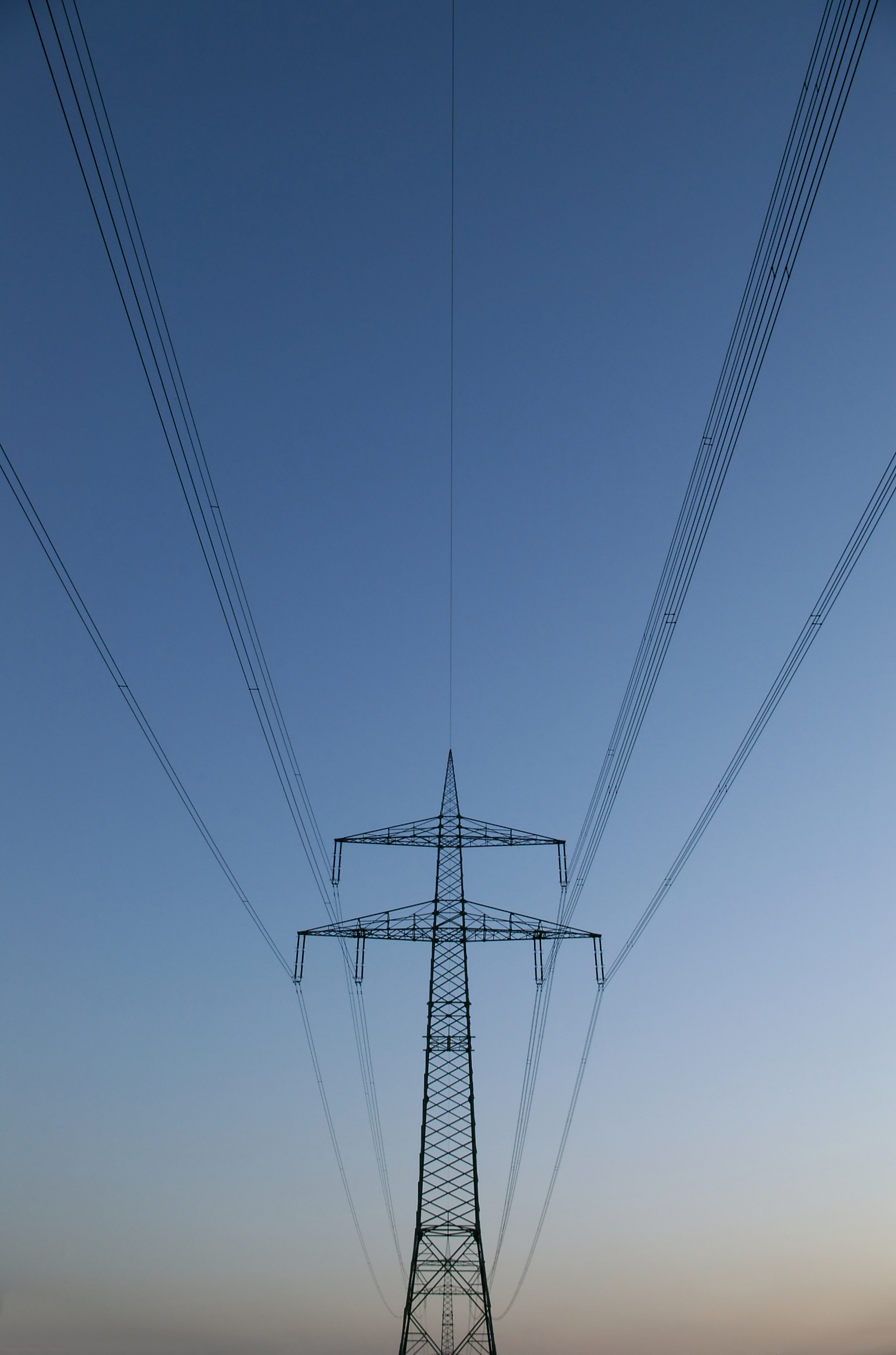 Hochspannungsfreileitung bei Unna, Donau- bzw. A-Mast